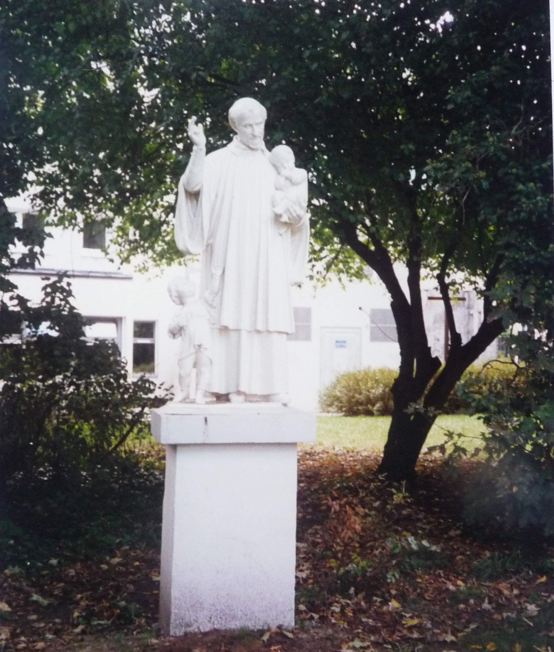 Statut représentant Saint Vincent de Paul situé dans le parc des Sœurs à Sevran érigée au temps des Sœurs.